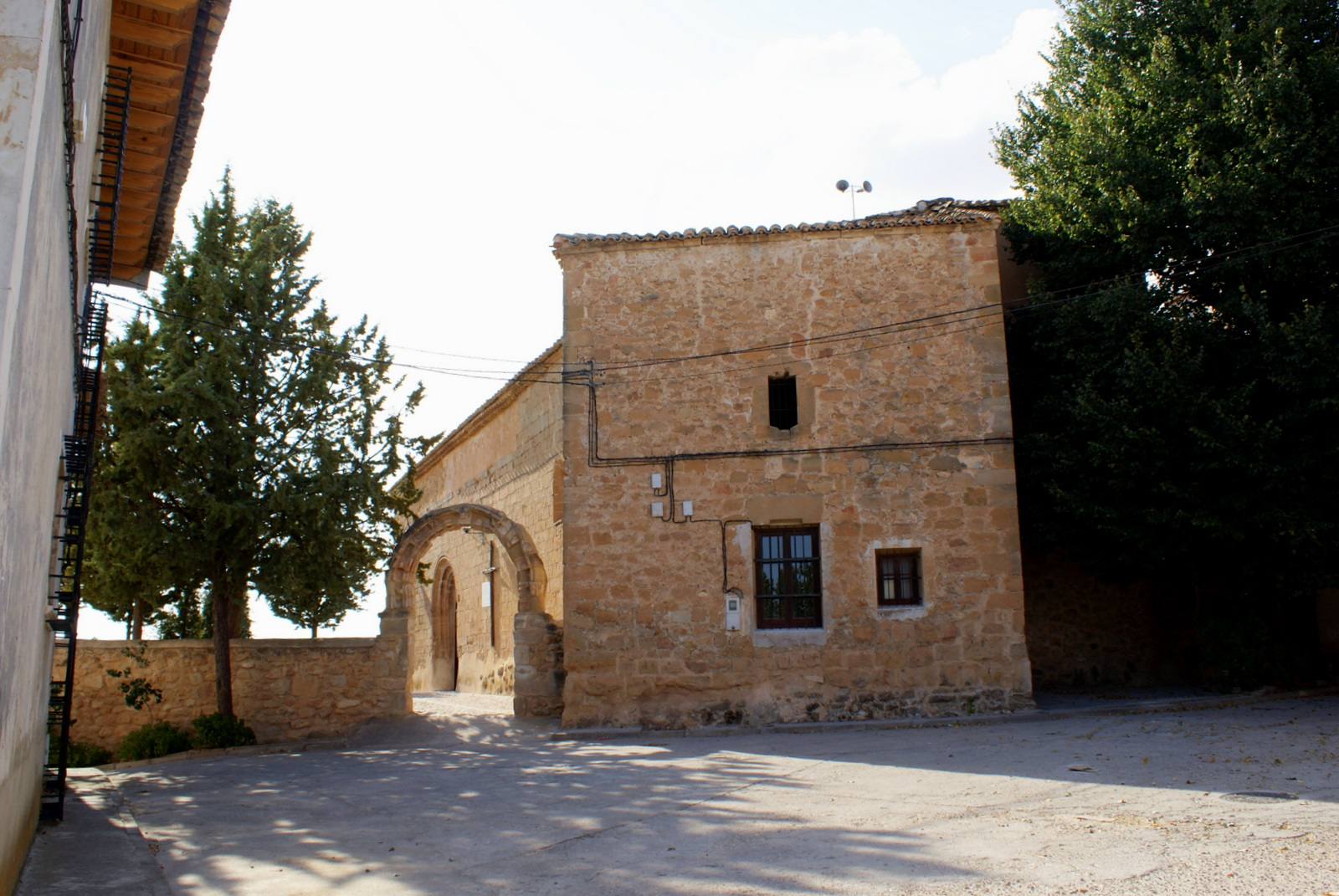 Iglesia de Nuestra Señora de la Asunción de Albendea, primer tercio del siglo XVI. Albendea, Cuenca, Castilla-La Mancha